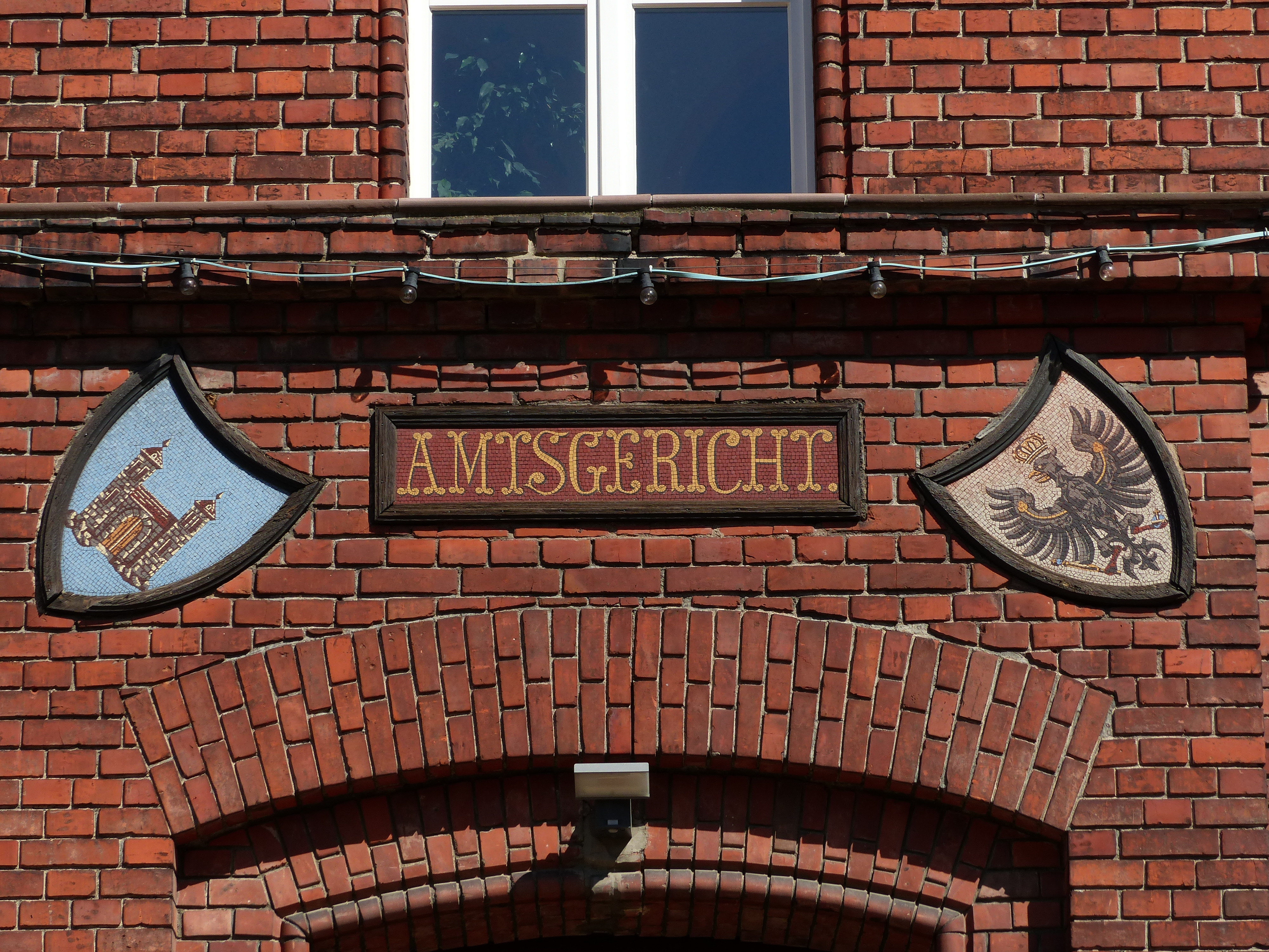 Runkel: Ehemaliges Amtsgericht, heutiges Rathaus